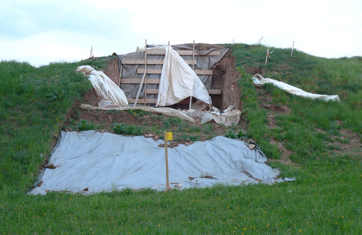 Blick auf einen Grabungsschnitt im Wall der Hünenburg bei Watenstedt